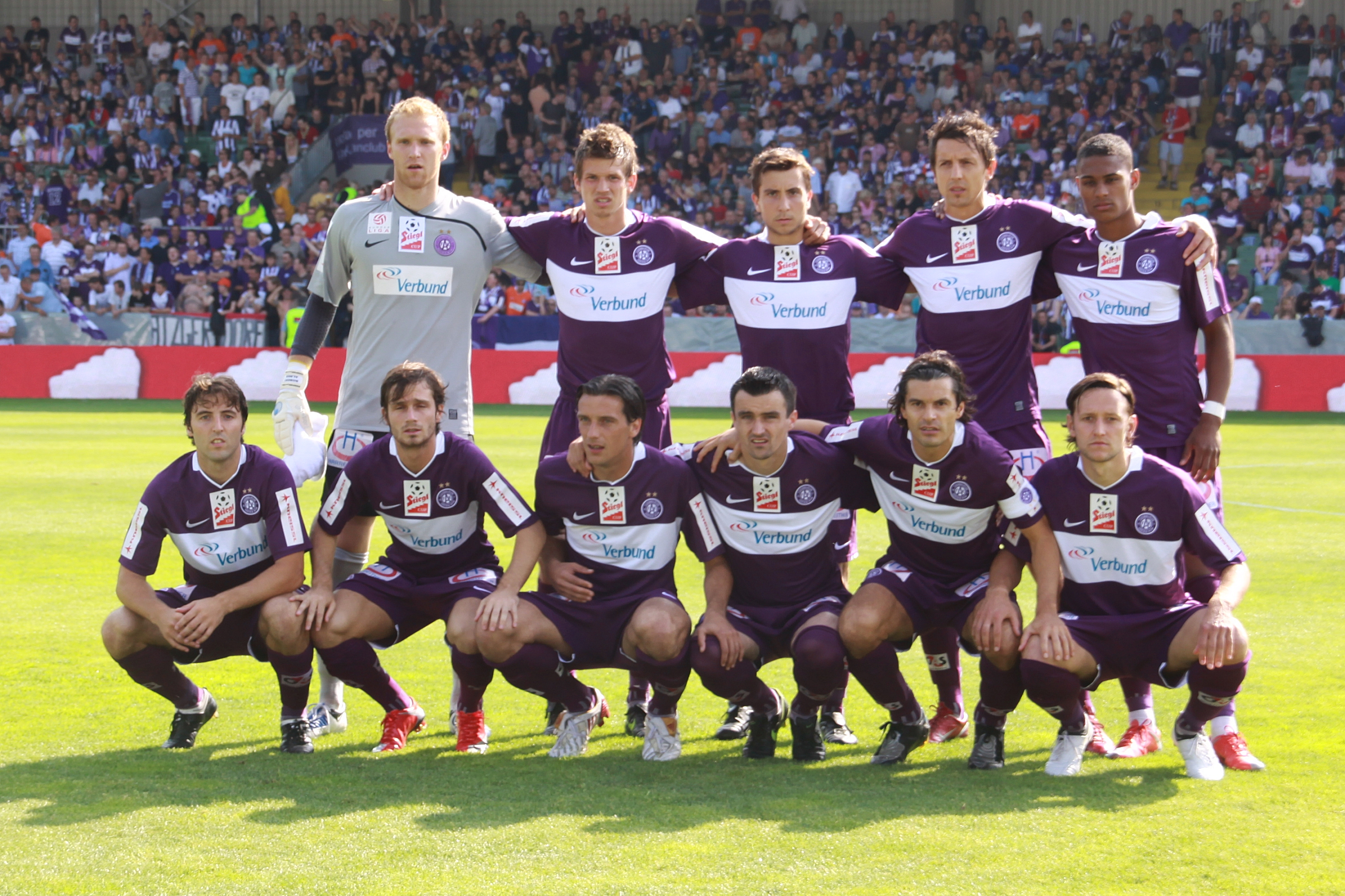 Finale im Österreichischer Fußball-Cup 2008/09 - Mannschaftsbild des Cupsiegers FK Austria Wien